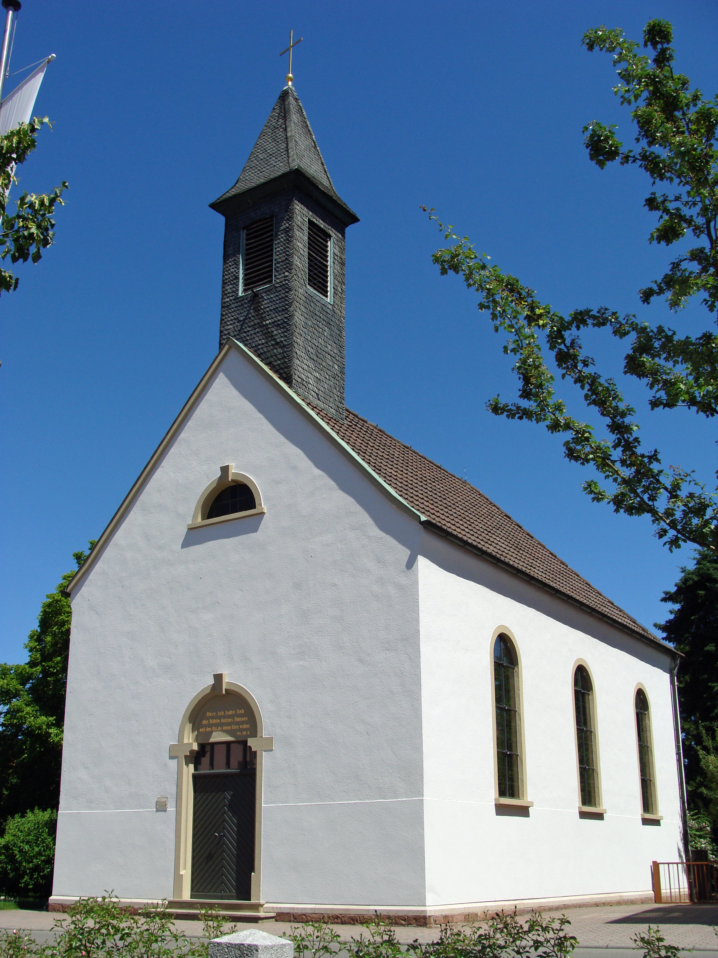 Deutschland: Evangelische Kirche der Gemeinde Brühl